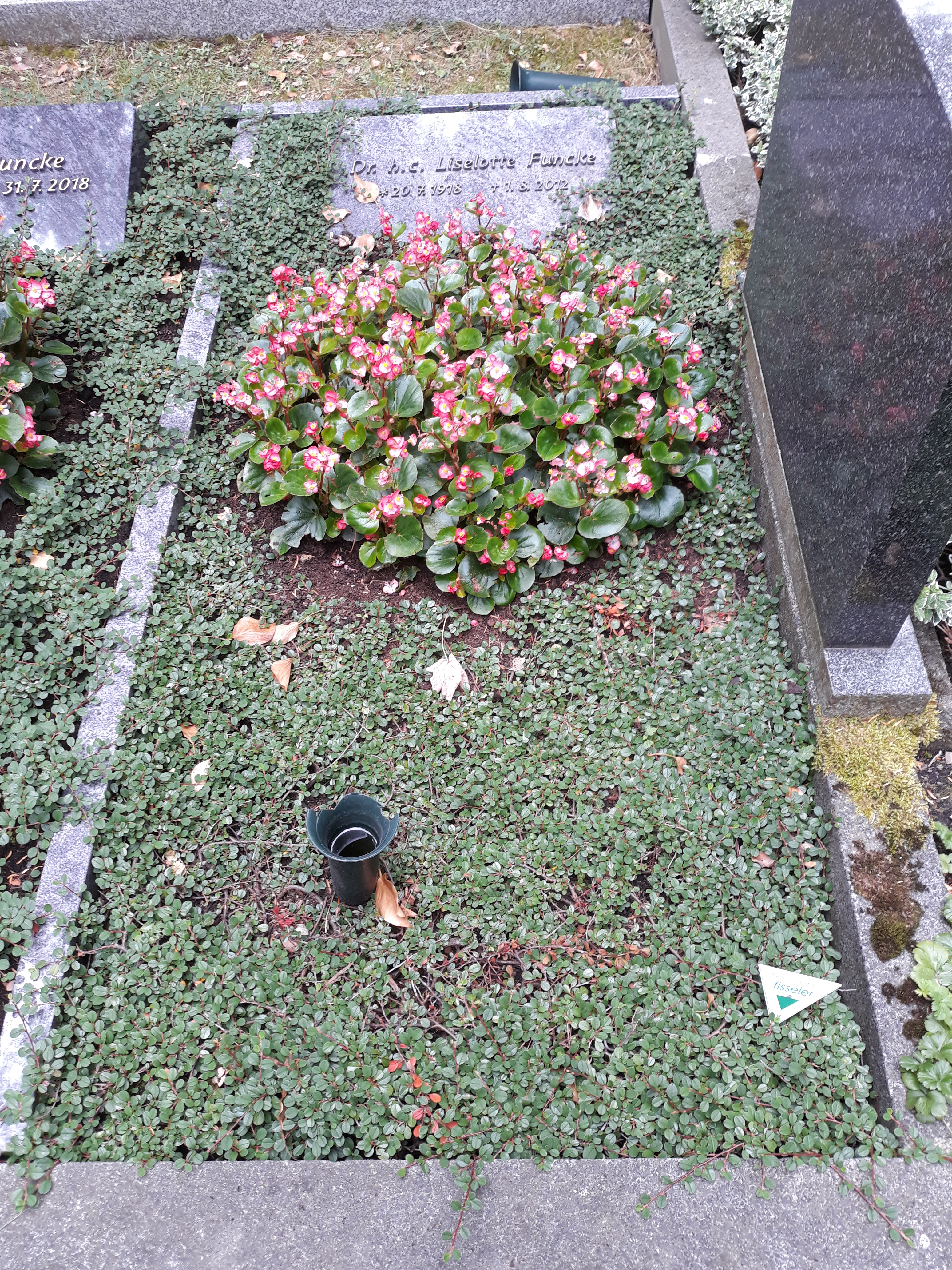 Das Grab der deutschen Politikerin Liselotte Funcke auf dem Buschey-Friedhof in Hagen (Westfalen).